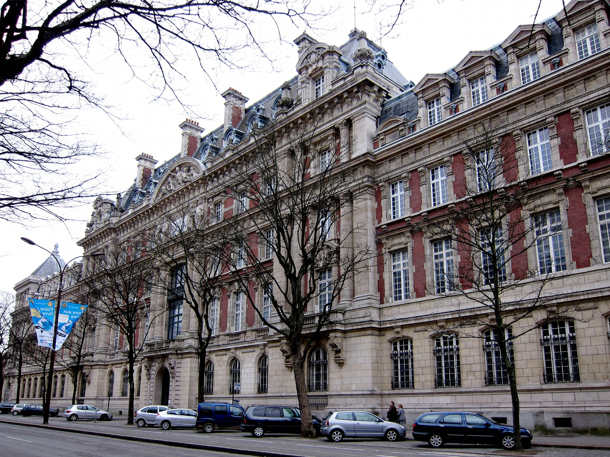 L'École Nationale Supérieure des Arts et Métiers (ENSAM) de Lille (Nord).